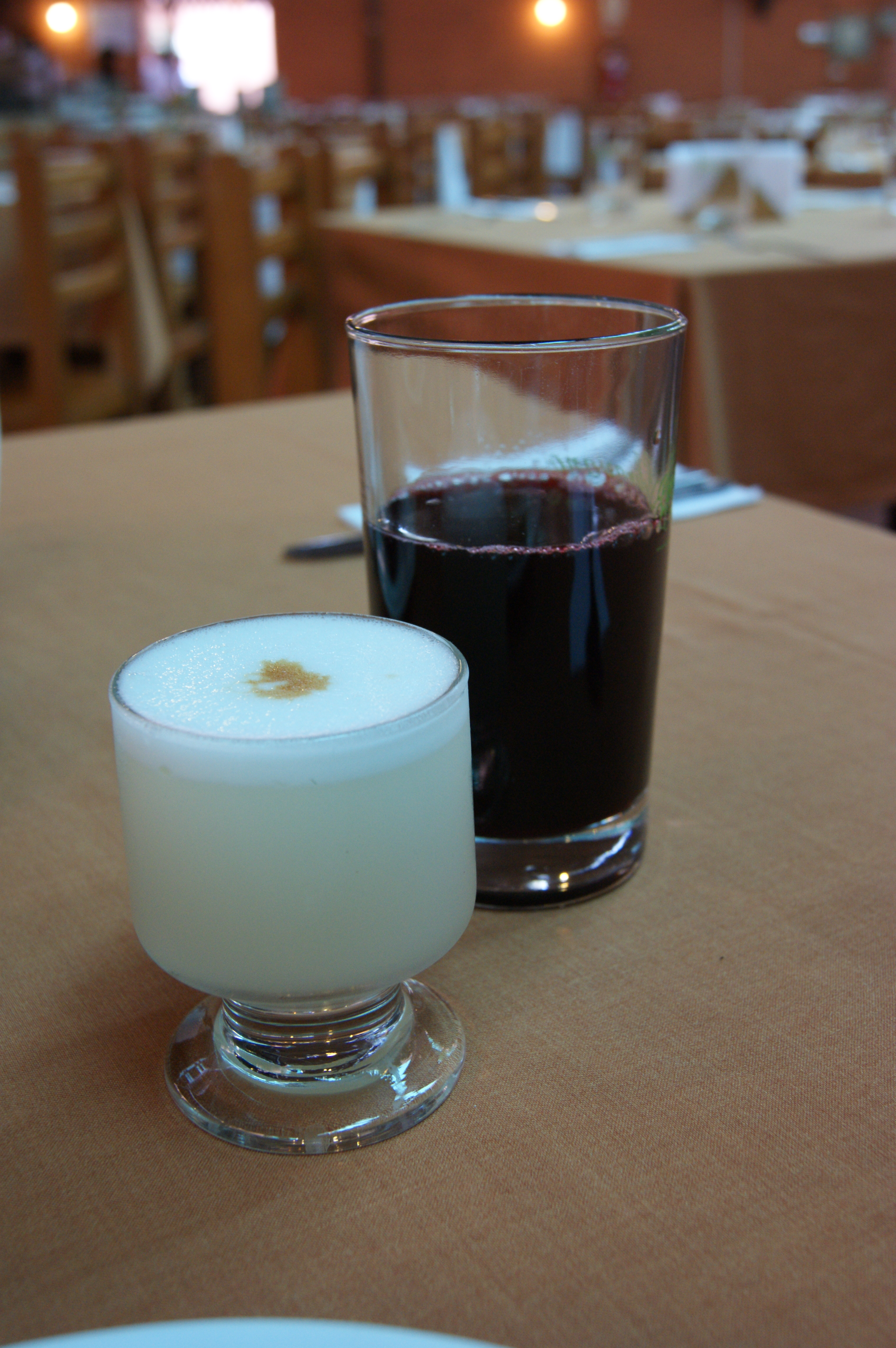 Pisco sour (adelante) y chicha morada (atras). Restaurant El Bolivariano, Lima-Perú.